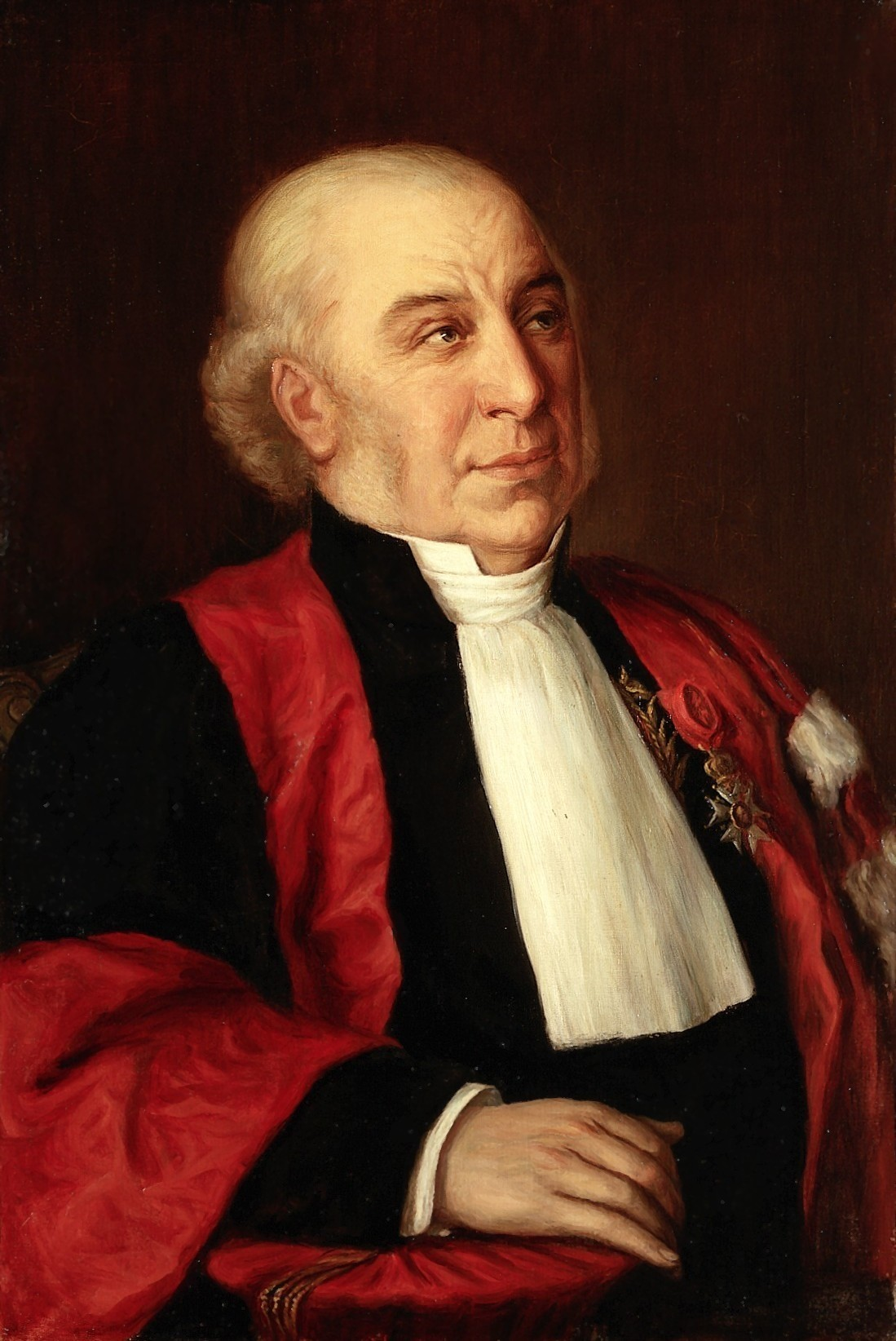 Joseph Bienaimé Caventou. Oil painting